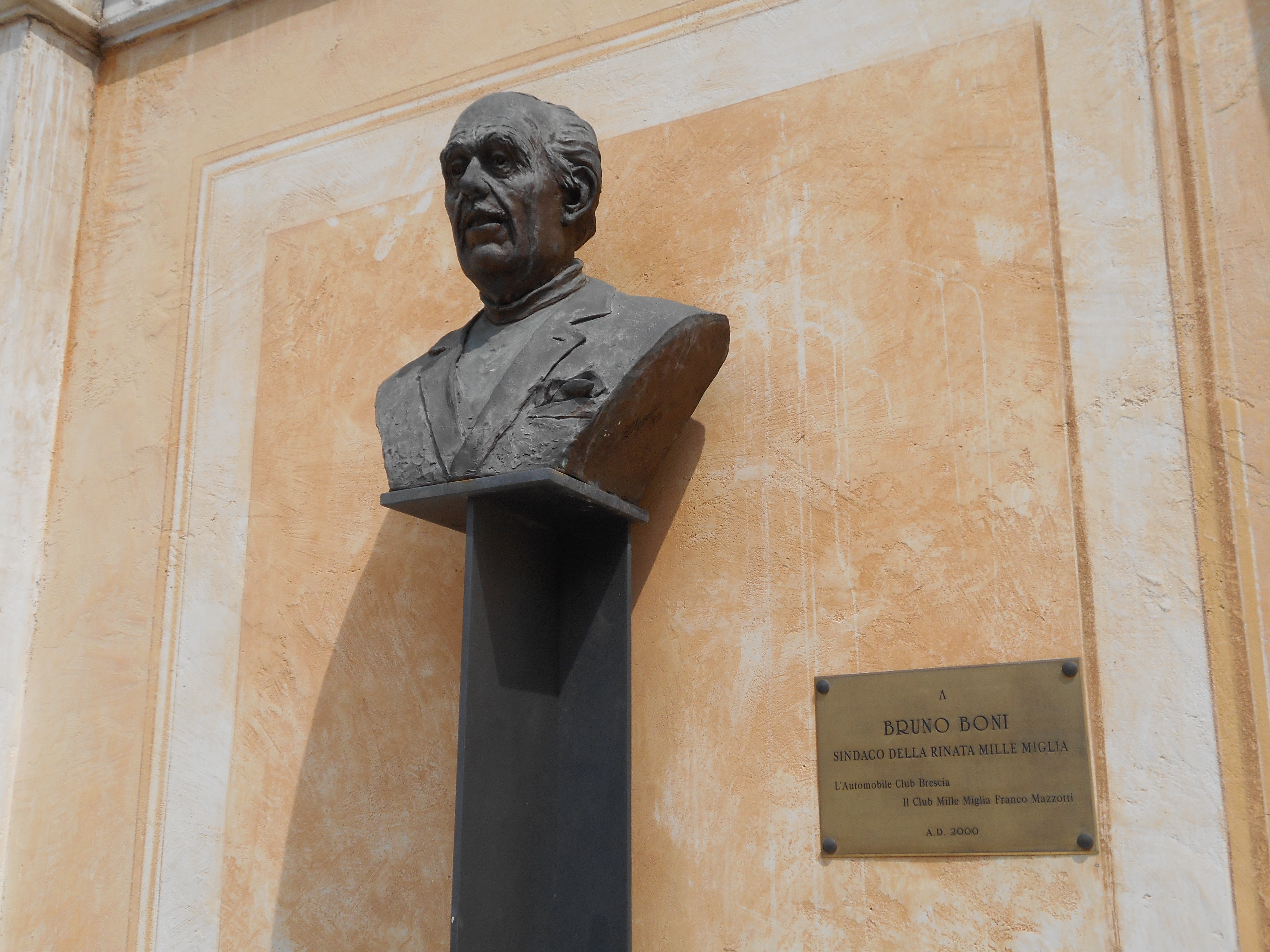 busto a Bruno Boni, piazza Bruno Boni, Brescia